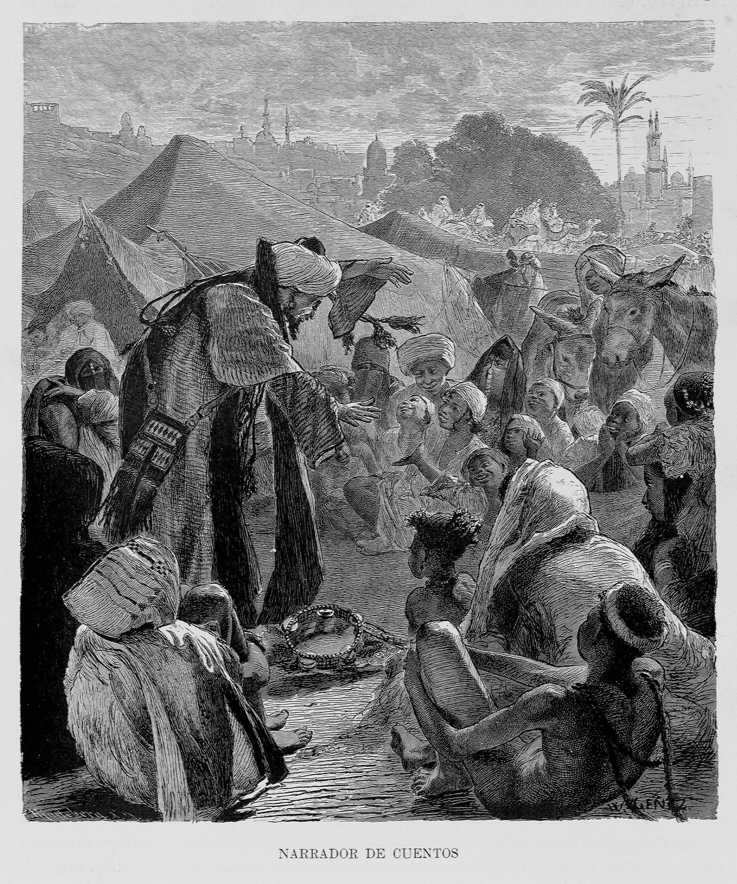 Autor: Ebers, Georg Moritz, 1837-1898 Descripción bibliográfica: Egipto / por Jorge Ebers ; traducción directa del alemán por Antonio Bergnes de las Casas, revisada y corregida por Cayetano Vidal de Valenciano. - Ed. monumental ilustrada con 650 grabados ... del reputado pintor Cárlos Werner. - Barcelona : Espasa y Compañía, 1882?. - 2 v. (X, 408, [1] p., [14] h. de lám. ; 438, [1] p., [14] h. de lám.). : il. ; 40 cm Materia: Egipto - Historia Materia: Egipto - Descripciones y viajes - Siglo 19 Notas: Palau, t. 5, p. 1, lo fecha de manera aproximada en 1882. - Port. a dos tintas. - Antep. - Ilustrada con 650 grabados intercalados en el texto y enriquecida con dos cartas geográficas tirada a tres tintas, una portada en colores y 24 magnificas imitaciones de las artísticas acuarelas del pintor Carlos Weiner Traductor:Bergnes de las Casas, Antonio, 1801-1879 Ilustrador:Werner, Karl, 1821-1888, il. Localización: Libro completo